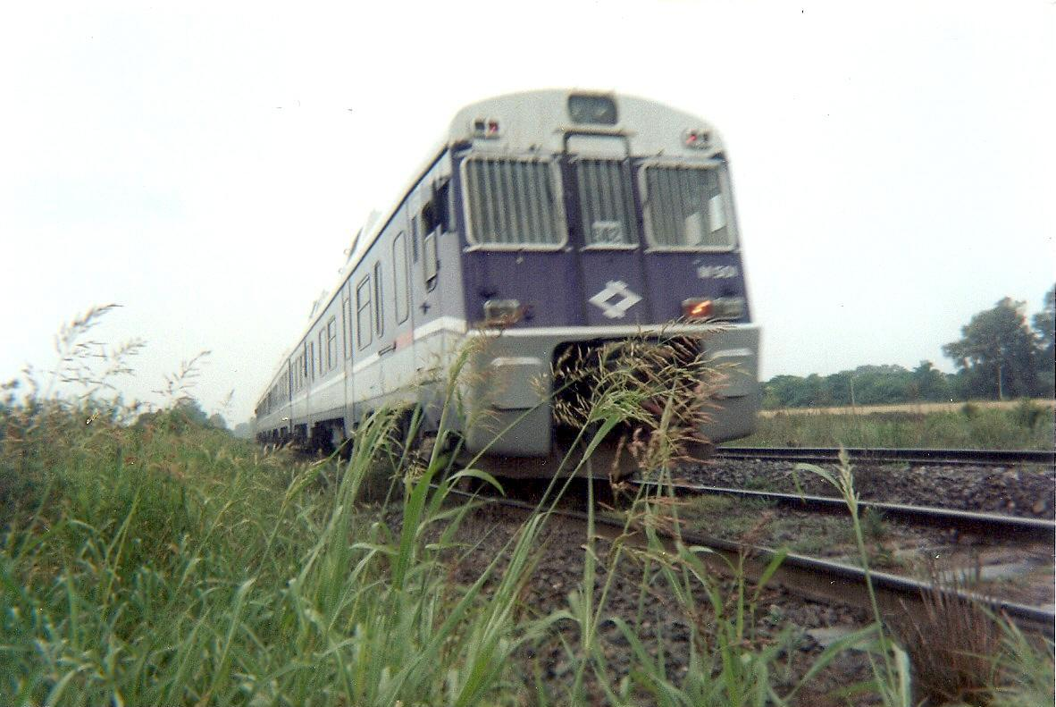 Coche motor fiat-caf serie 593 en cercanias de la estacion Escobar.